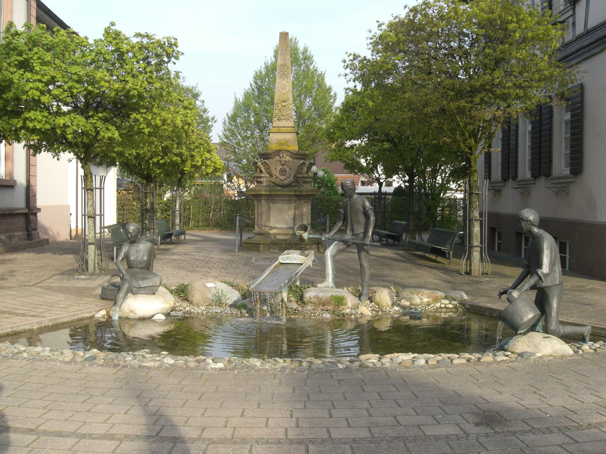 Goldwaschbrunnen in Goldscheuer